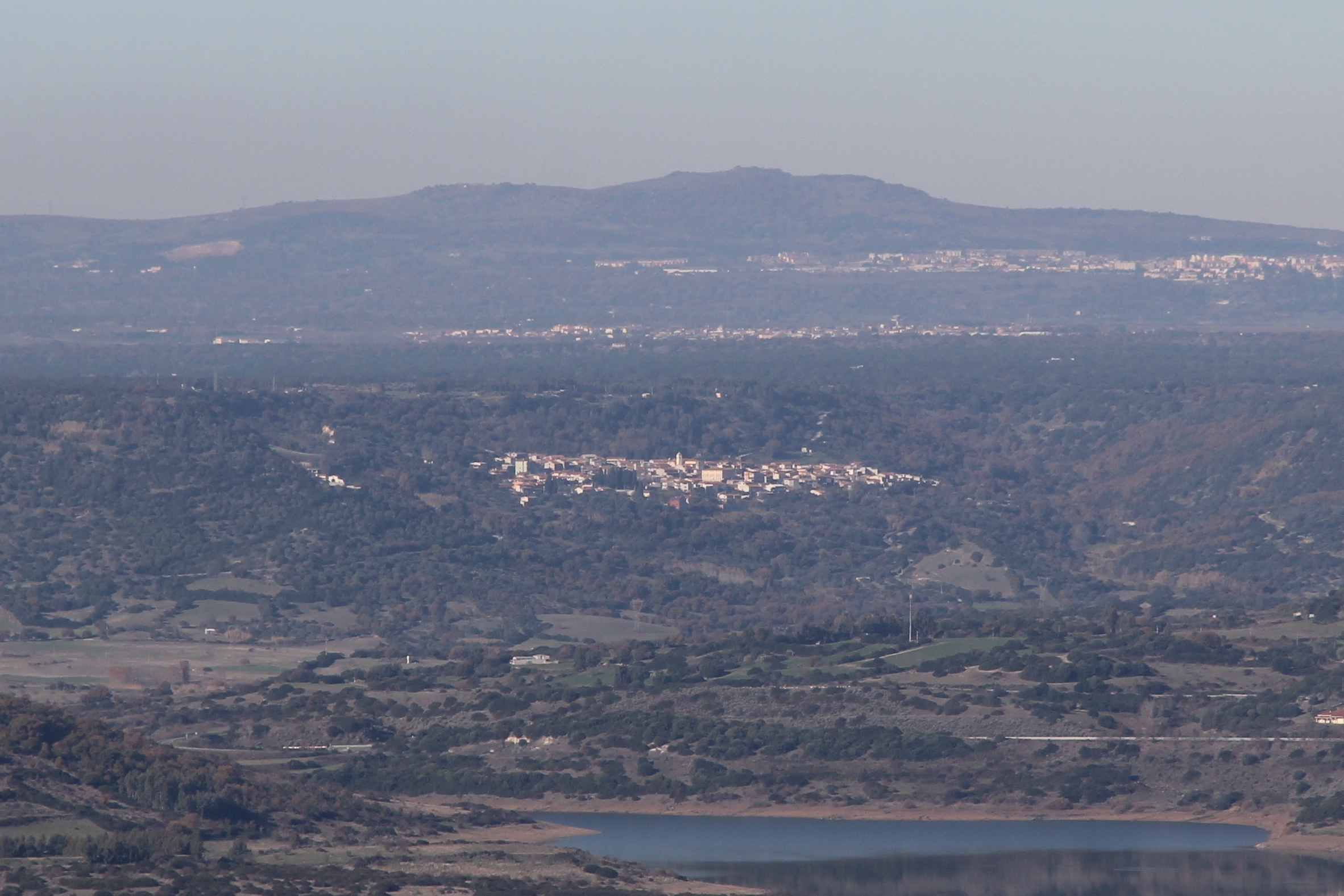 Aidomaggiore